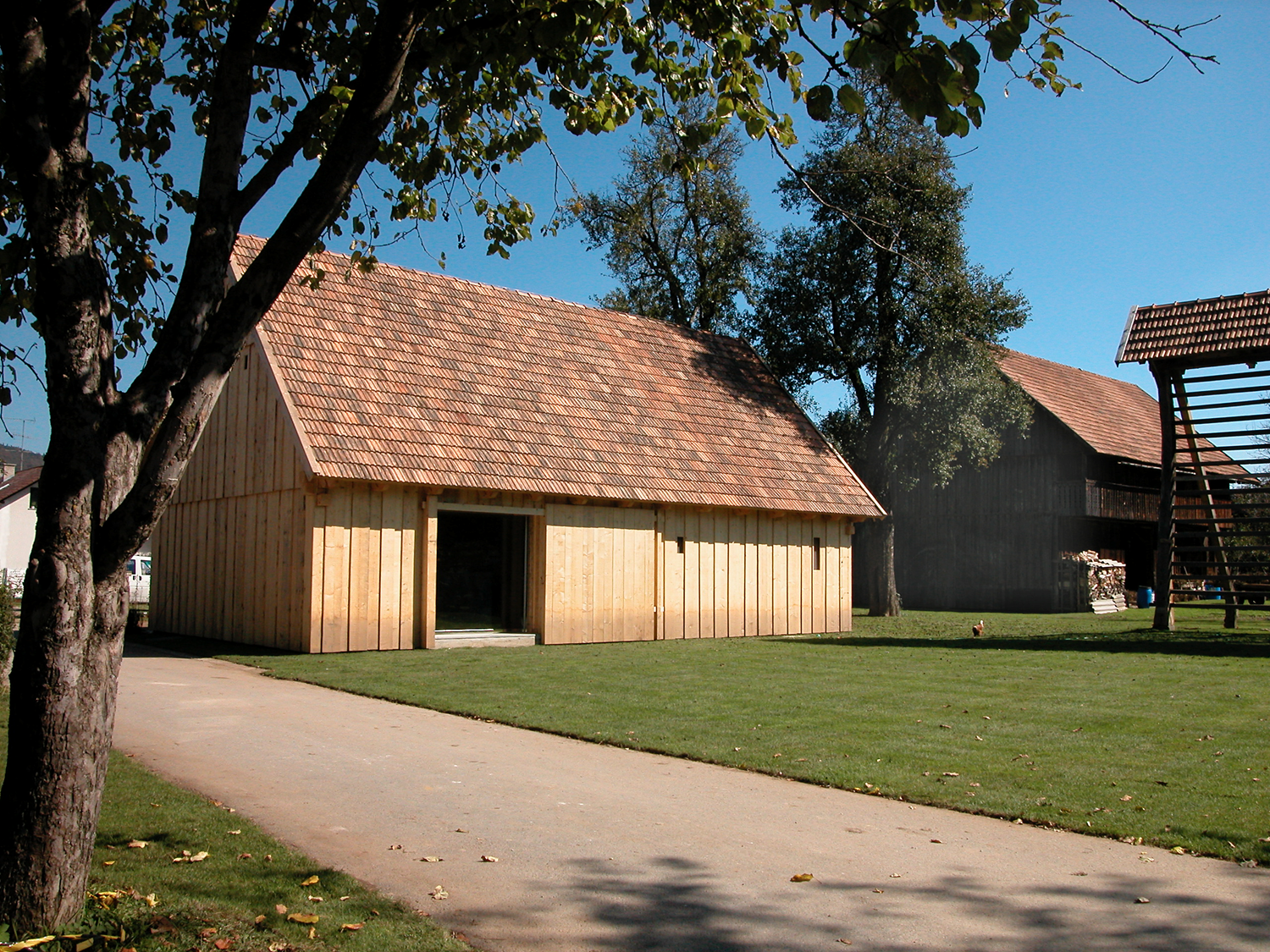 Skedenj škrabčeve domačije